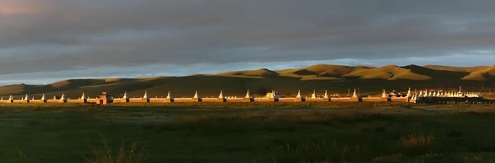 Erdene Zuu, Erdene Dsuu, Harhorin, Mongolia